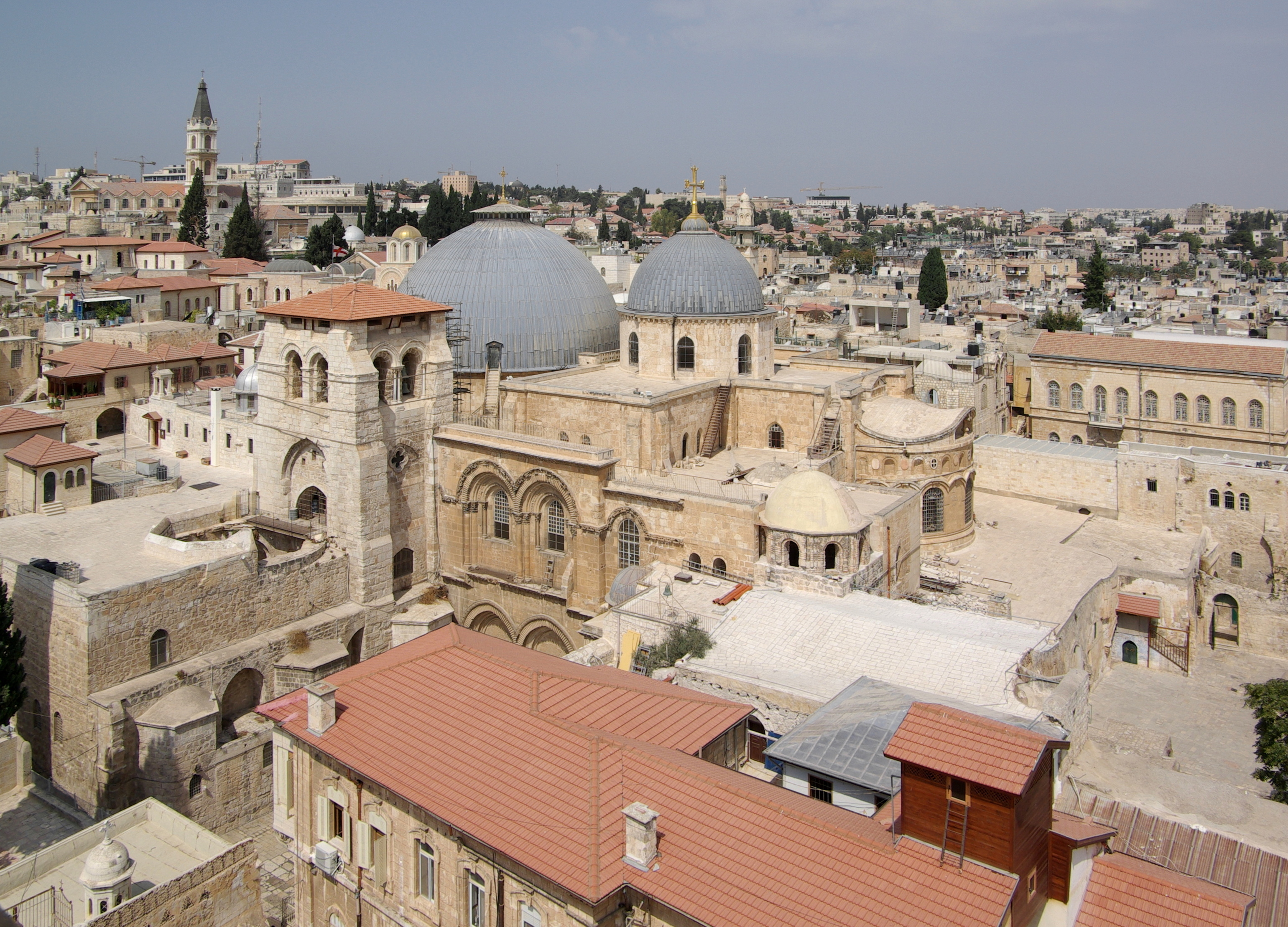 Jerusalem, Grabeskirche, vom Turm der Lutherischen Erlöserkirche aus gesehen